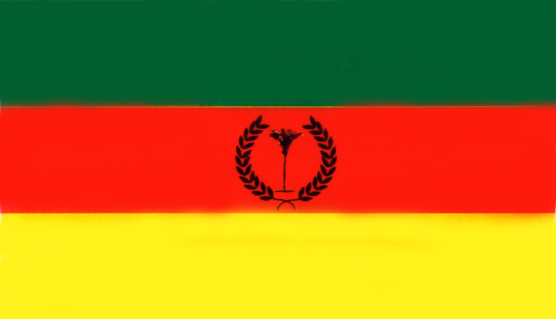 Bandera del Municipio Ayacucho